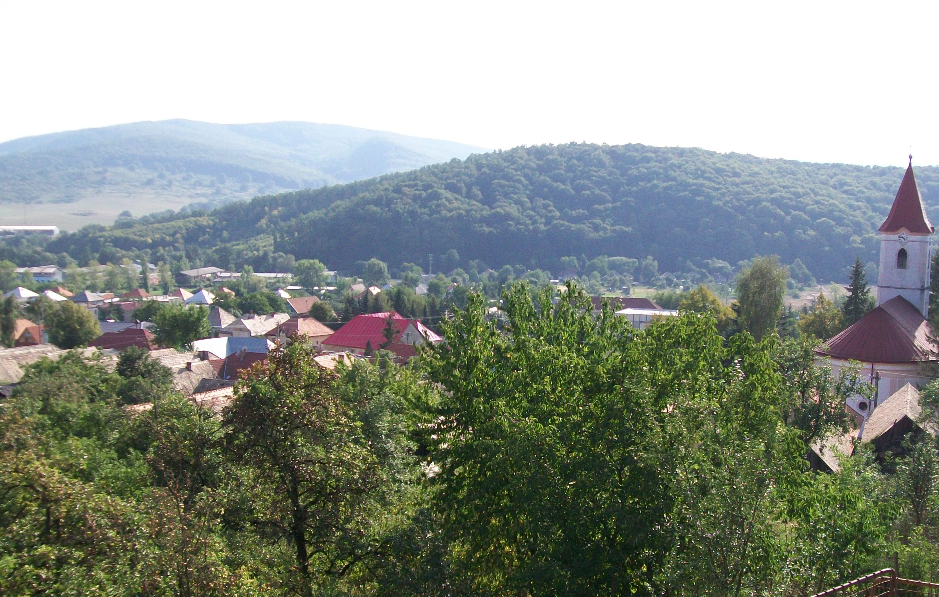 Pohľad na dedinu Lovinobaňu v okrese Lučenec.